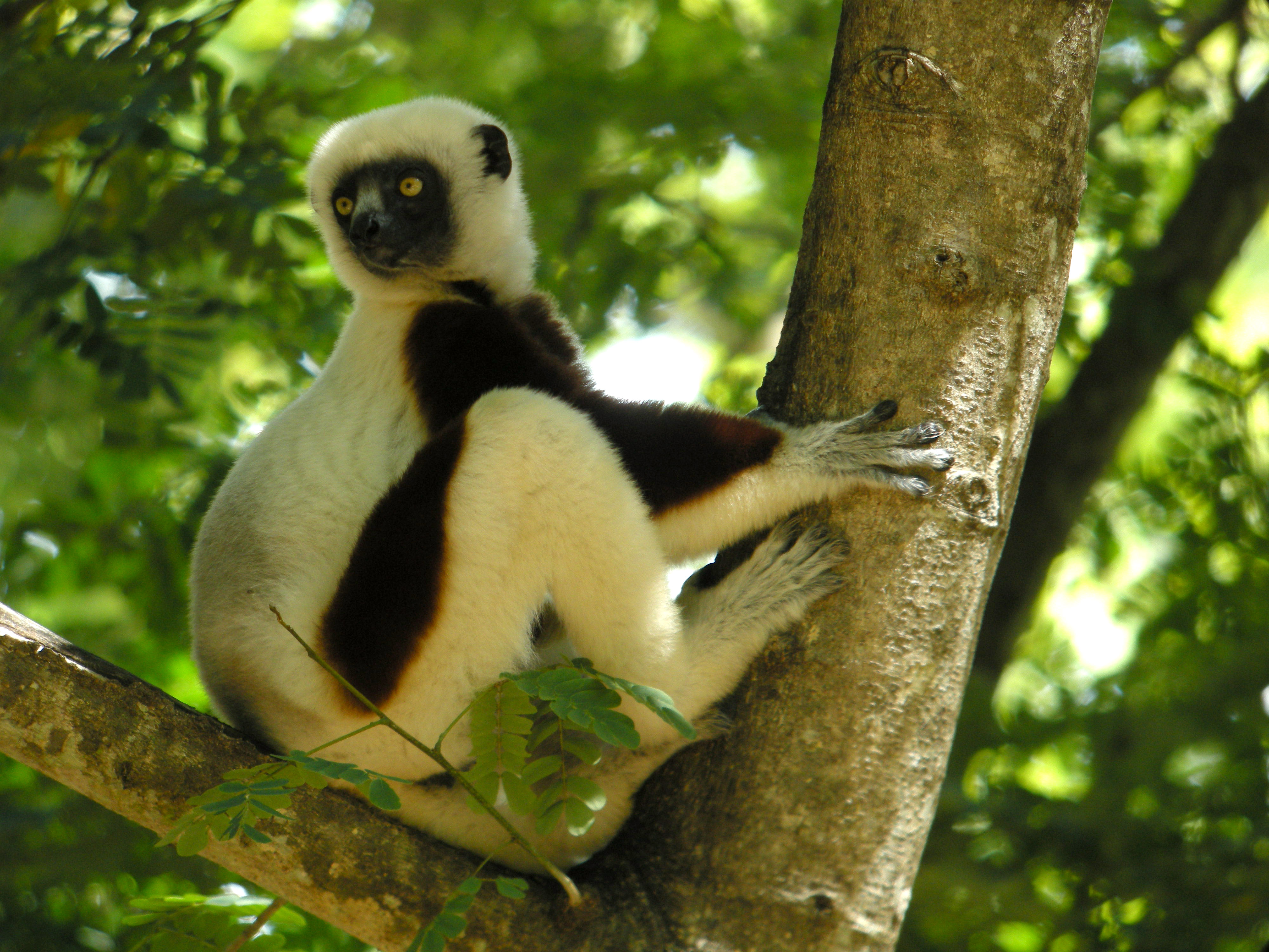 Coquerel's Sifaka, Ankarafantsika, Madagascar Swarowski 80 HD 30 X, Coolpix P5100 (Adapter DCB)